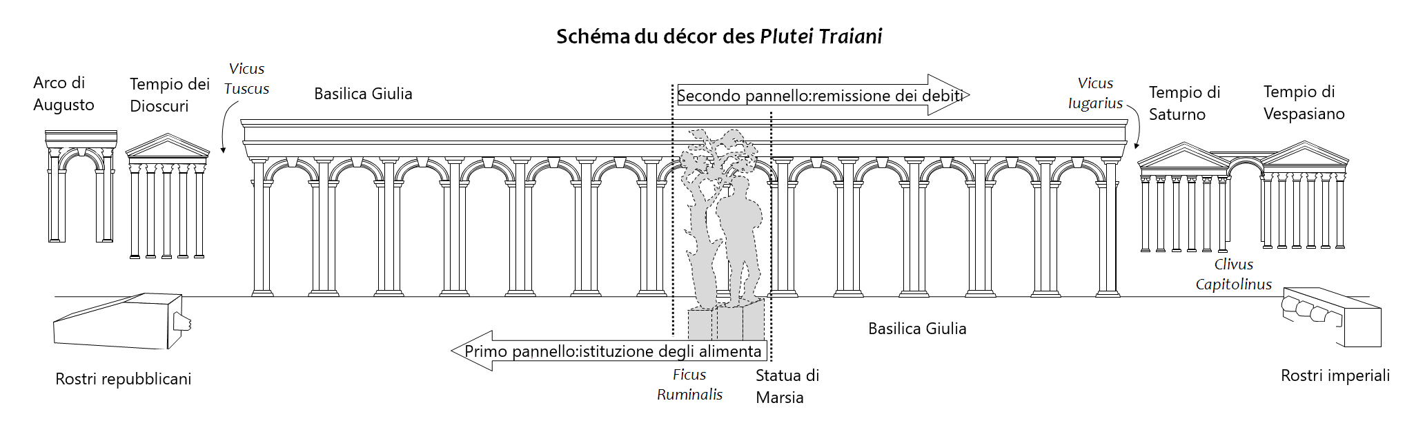 Schéma du décor en arrière-plan des Plutei Traiani.